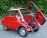 Zelf gemaakte foto van collega